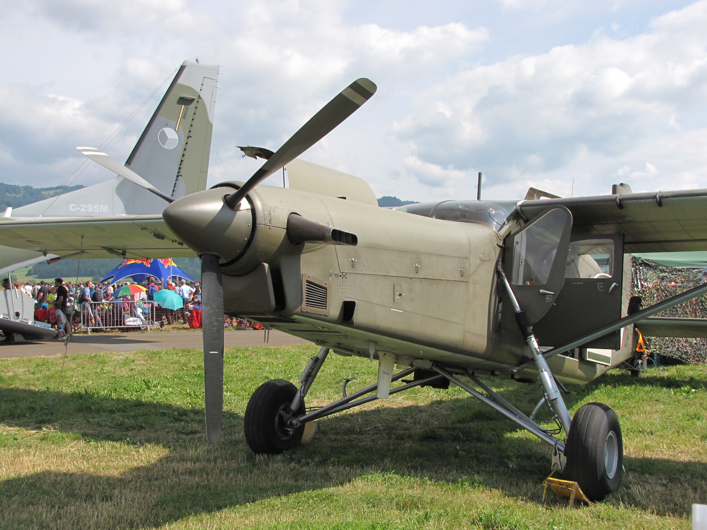 Pilatus PC-6, Gyártó: Pilatus Aircraft, Csúcssebesség: 232 km/h, AirPower 2013